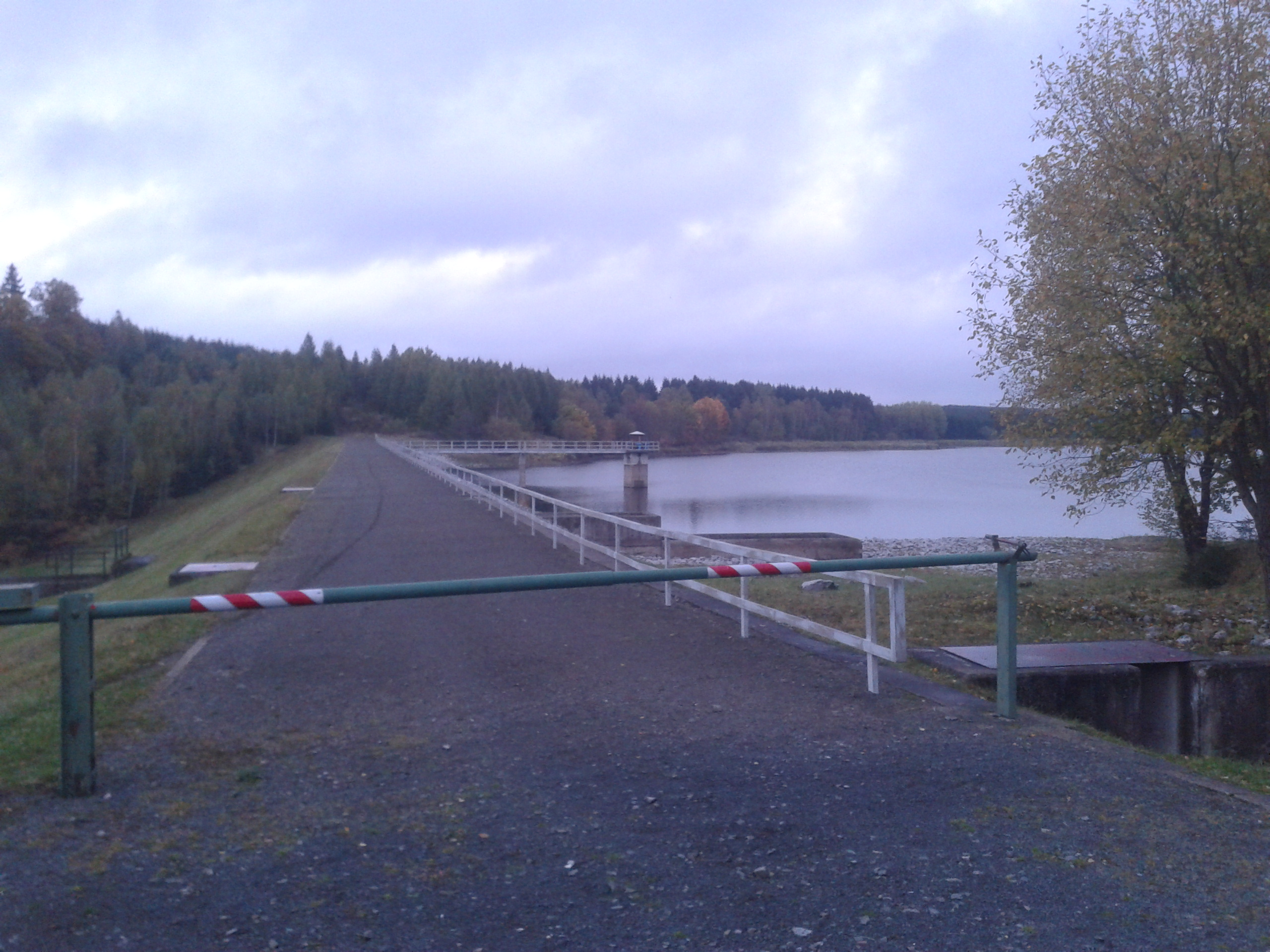 Teufelsteich